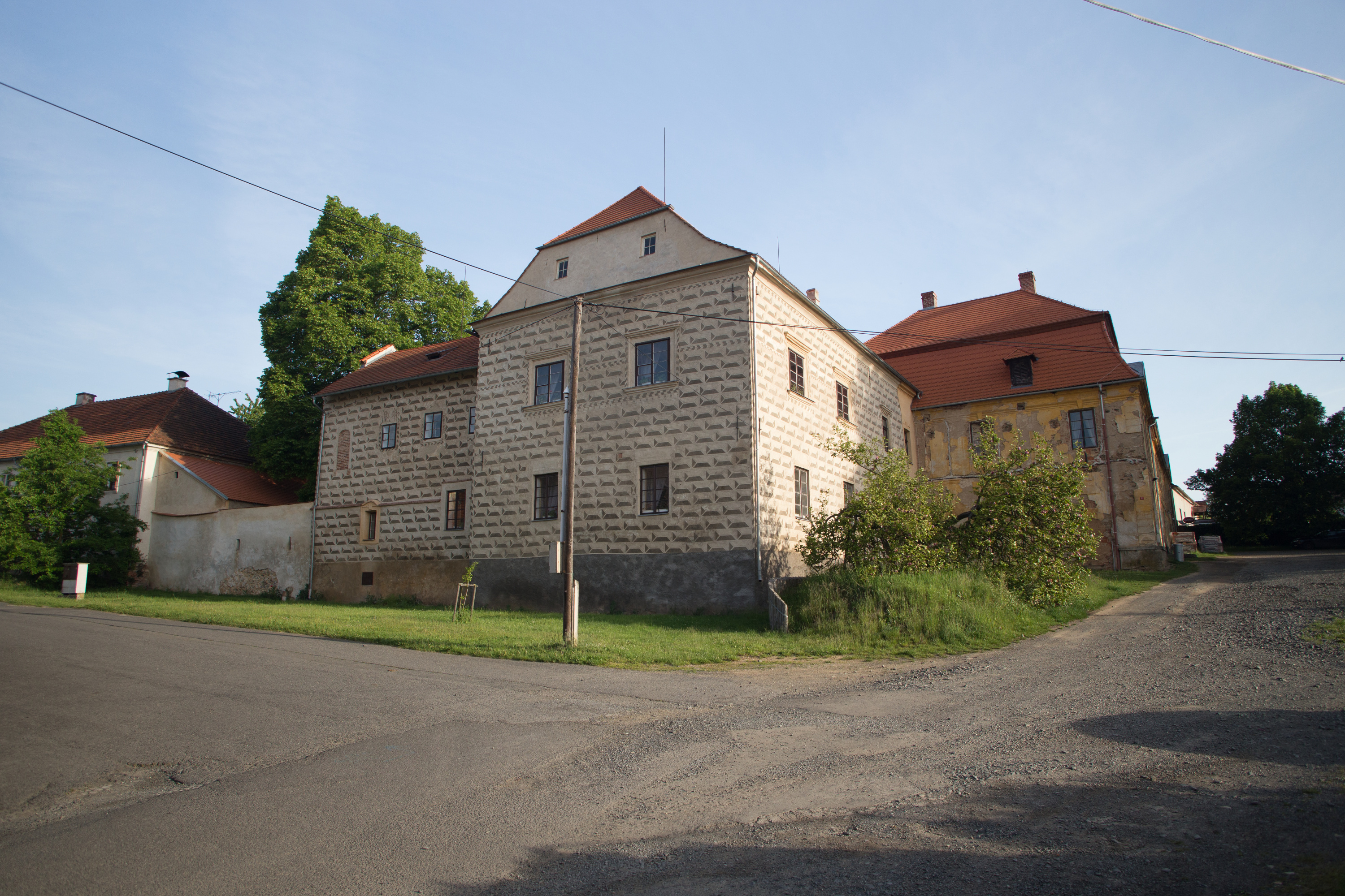 Starý zámek, U Černínského zámku 1, Chudenice.